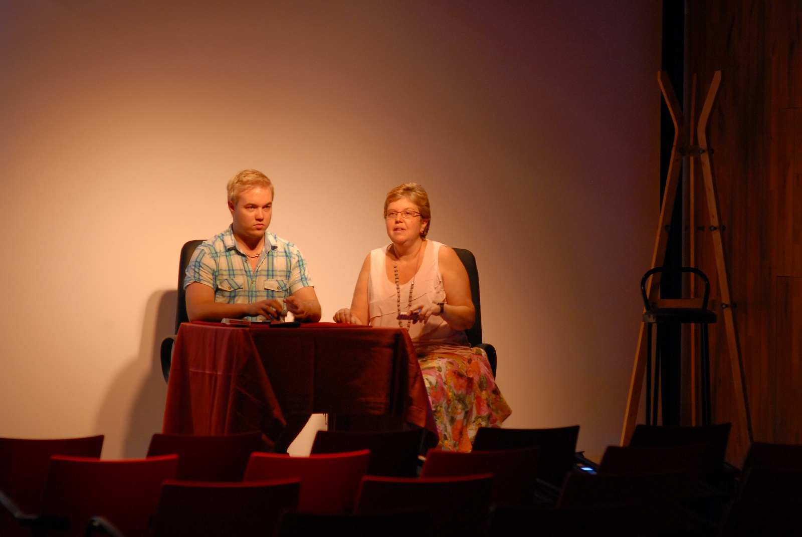 Sami Paavola y Carmen Martín